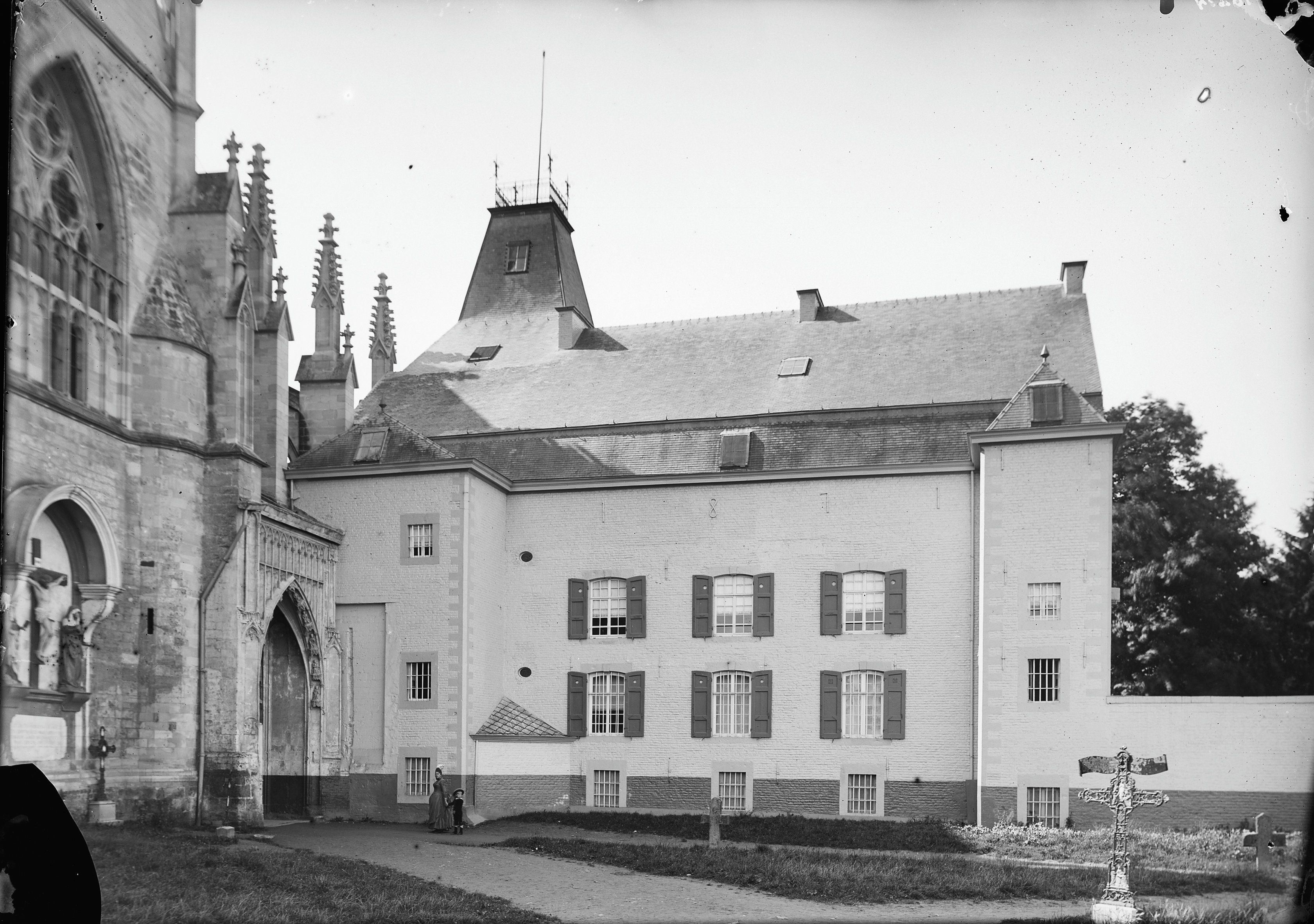 Voormalige Proosdij: noord zijde kerk